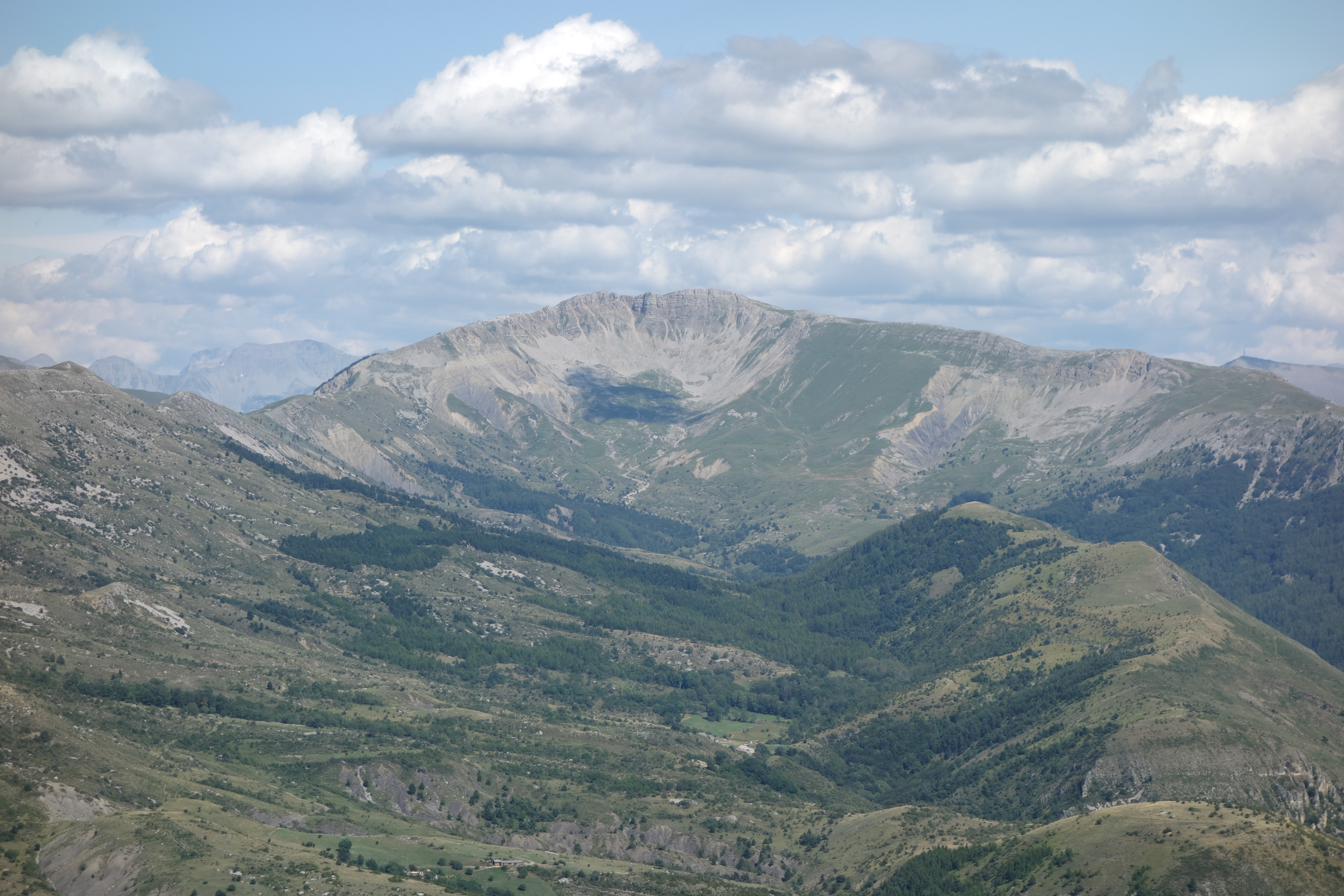 Sommet des Monges vu du sommet du Trainon, 1654 m, 10 km plus à l'ouest.